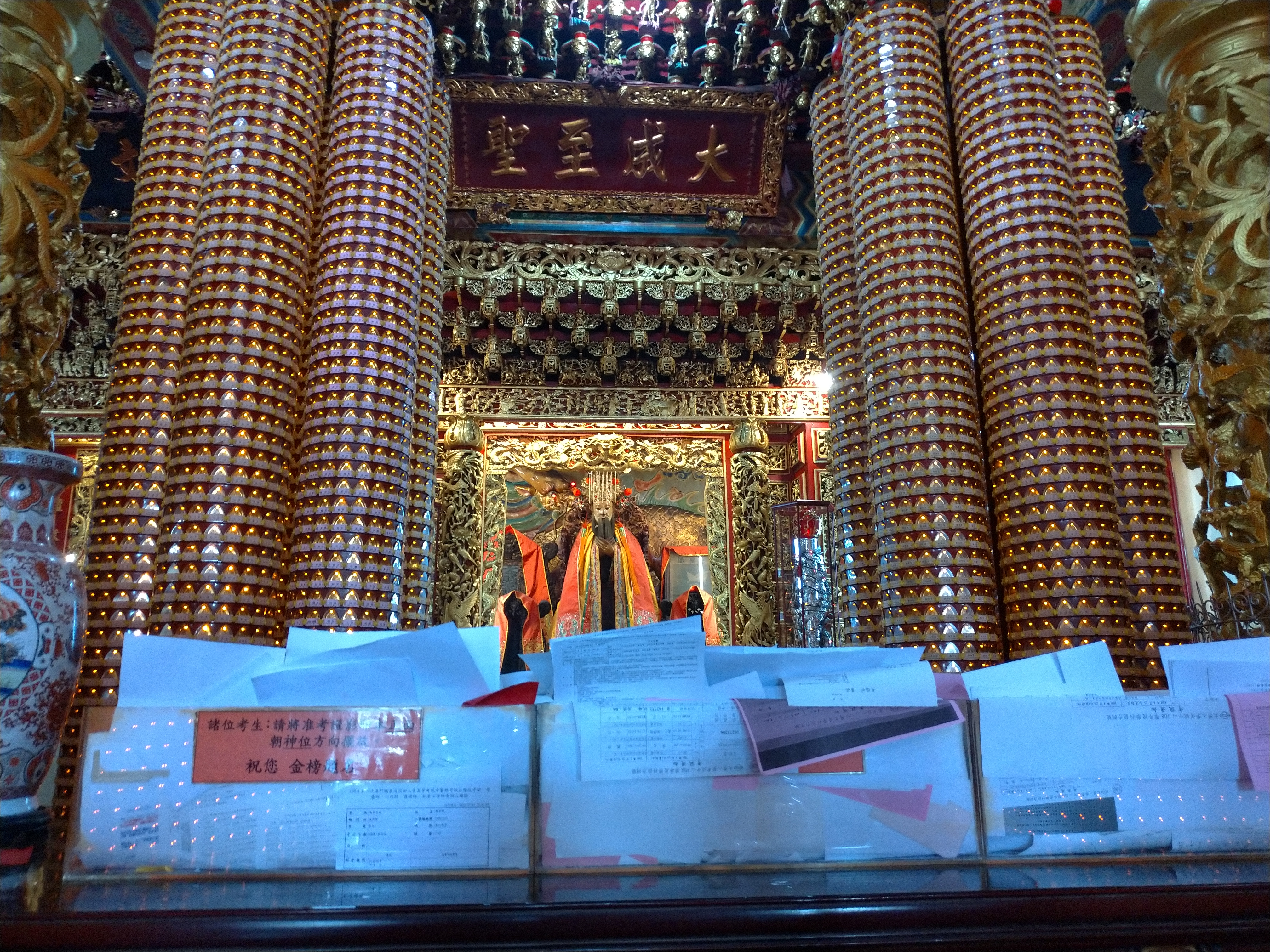 中文（台灣）: 文武聖殿至聖先師；使用本圖片請遵循(CC 姓名標示-非商業性-禁止改作)，Please follow (CC BY-NC-ND 3.0 TW)